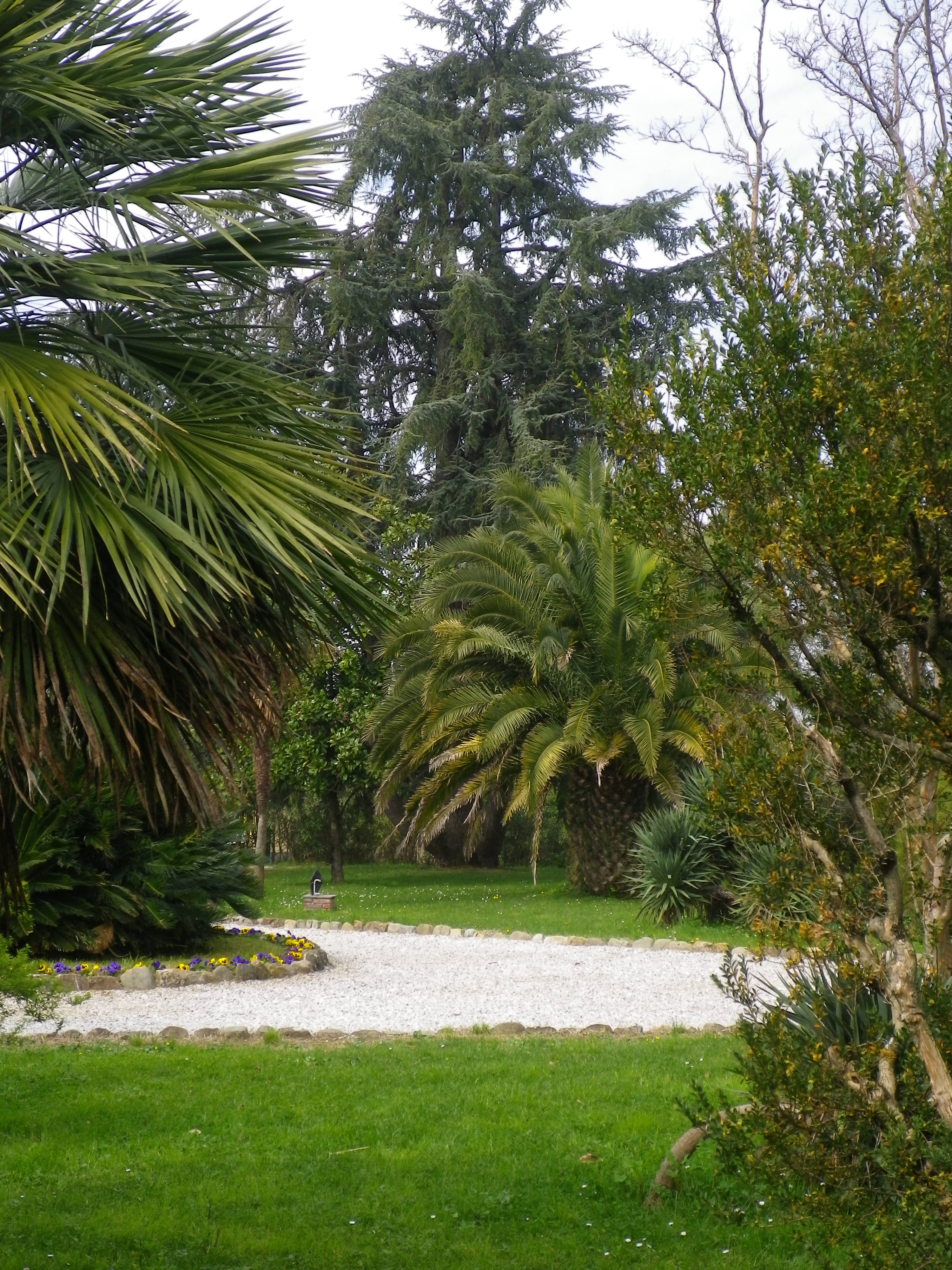 il giardino mediterraneo